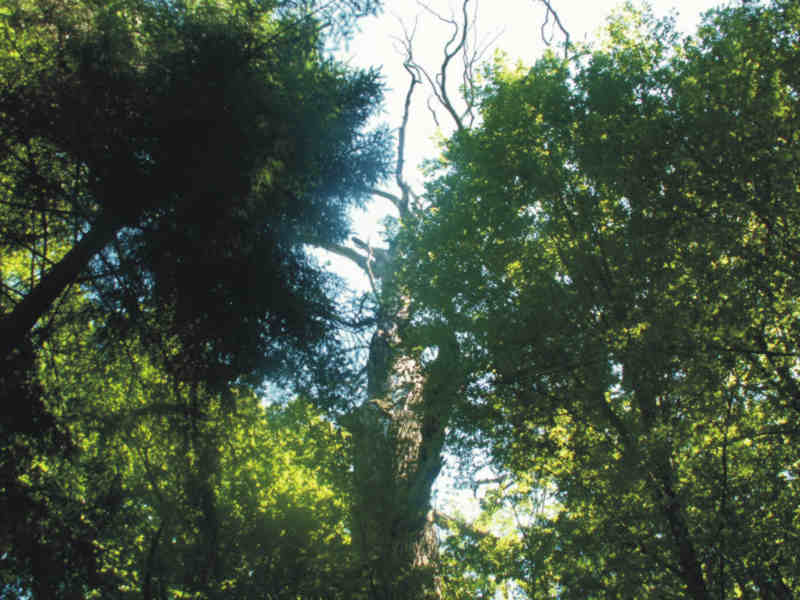 Quercus robur Dąb Dominator. Foto: Tomasz Niechoda